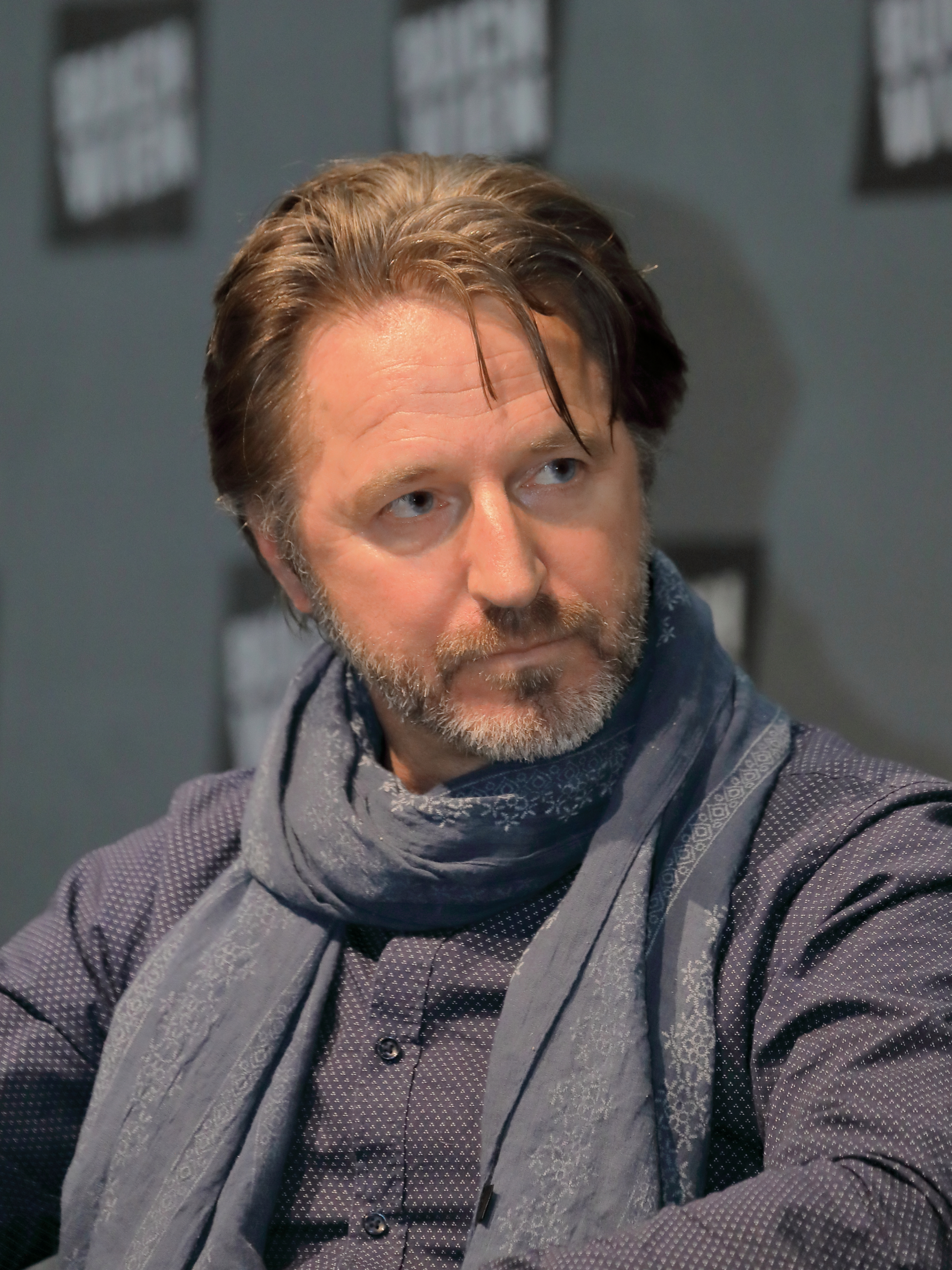 Der österreichische Journalist und Autor Oliver Tanzer auf der Wiener Buchmesse 2019.